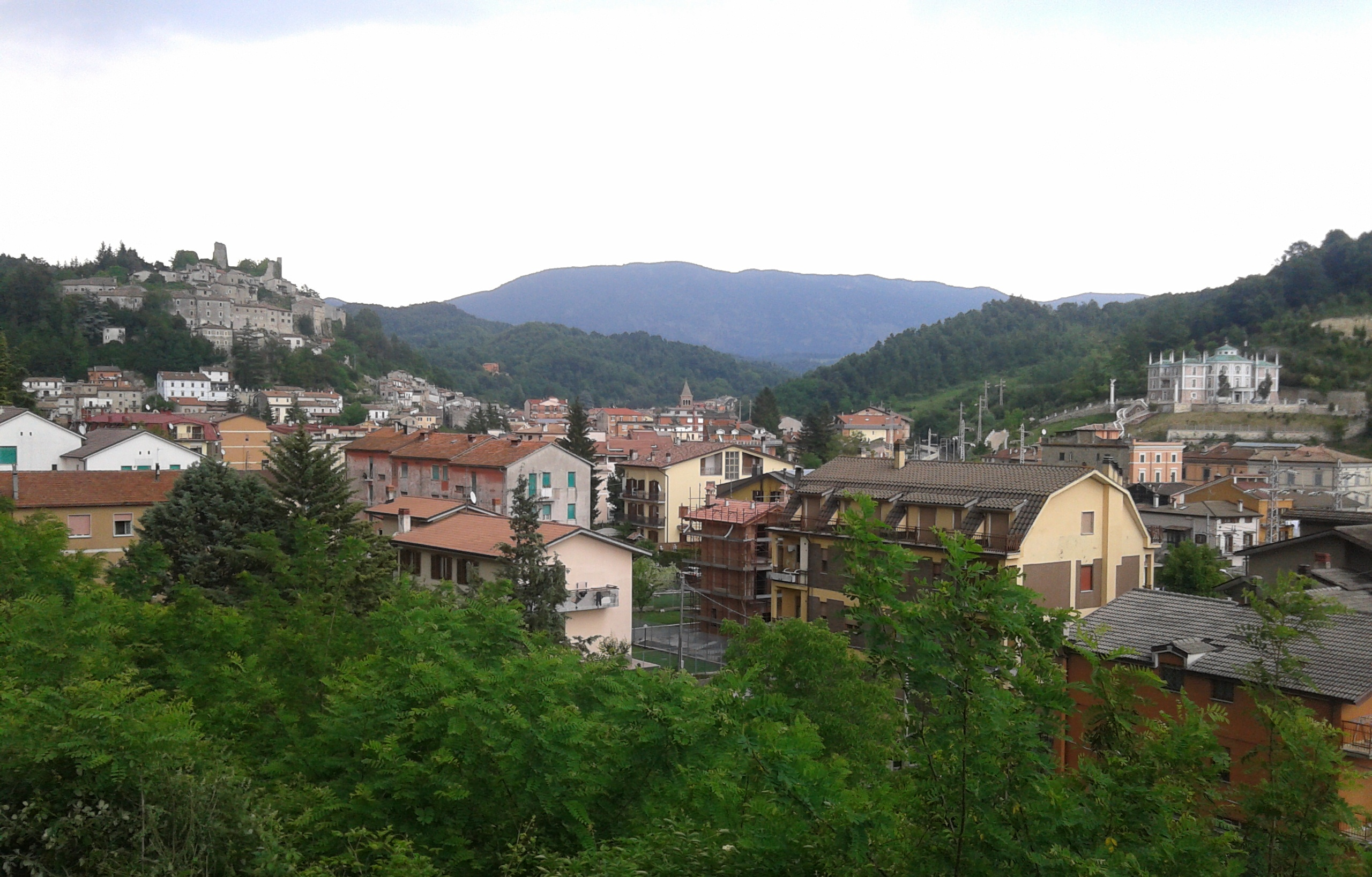 Foto panoramica di Carsoli